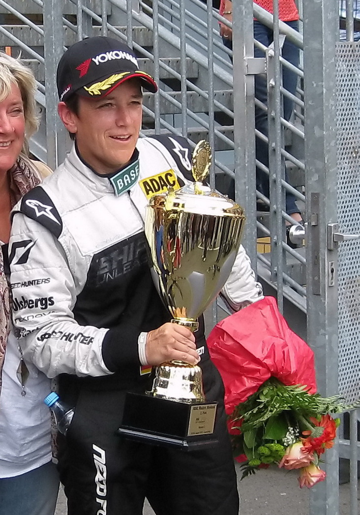 ADAC GT Masters - EuroSpeedway Lausitz 2012 (18)